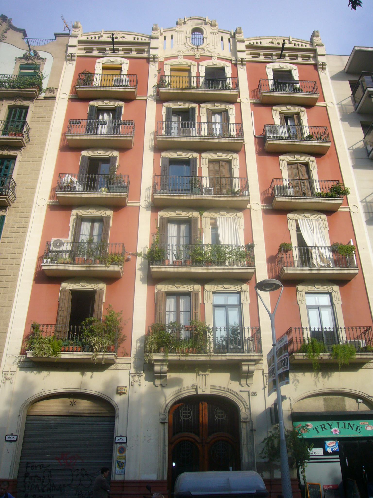 Casa Antònia Casals, edifici eclèctic situat al carrer Diputació, 26 de Barcelona, obra del mestre d'obres Antoni de Facerias i Marimon, 1915